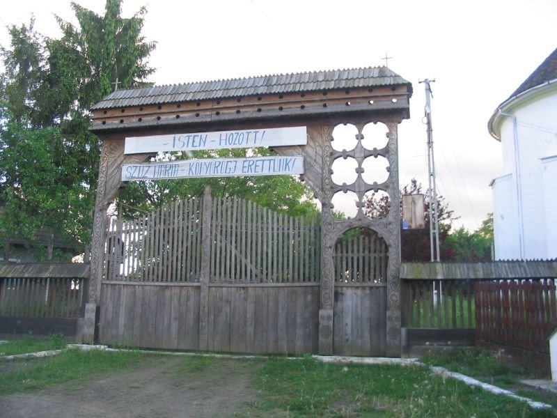 Székelykapu a futásfalvi katolikus templom előtt, 2006